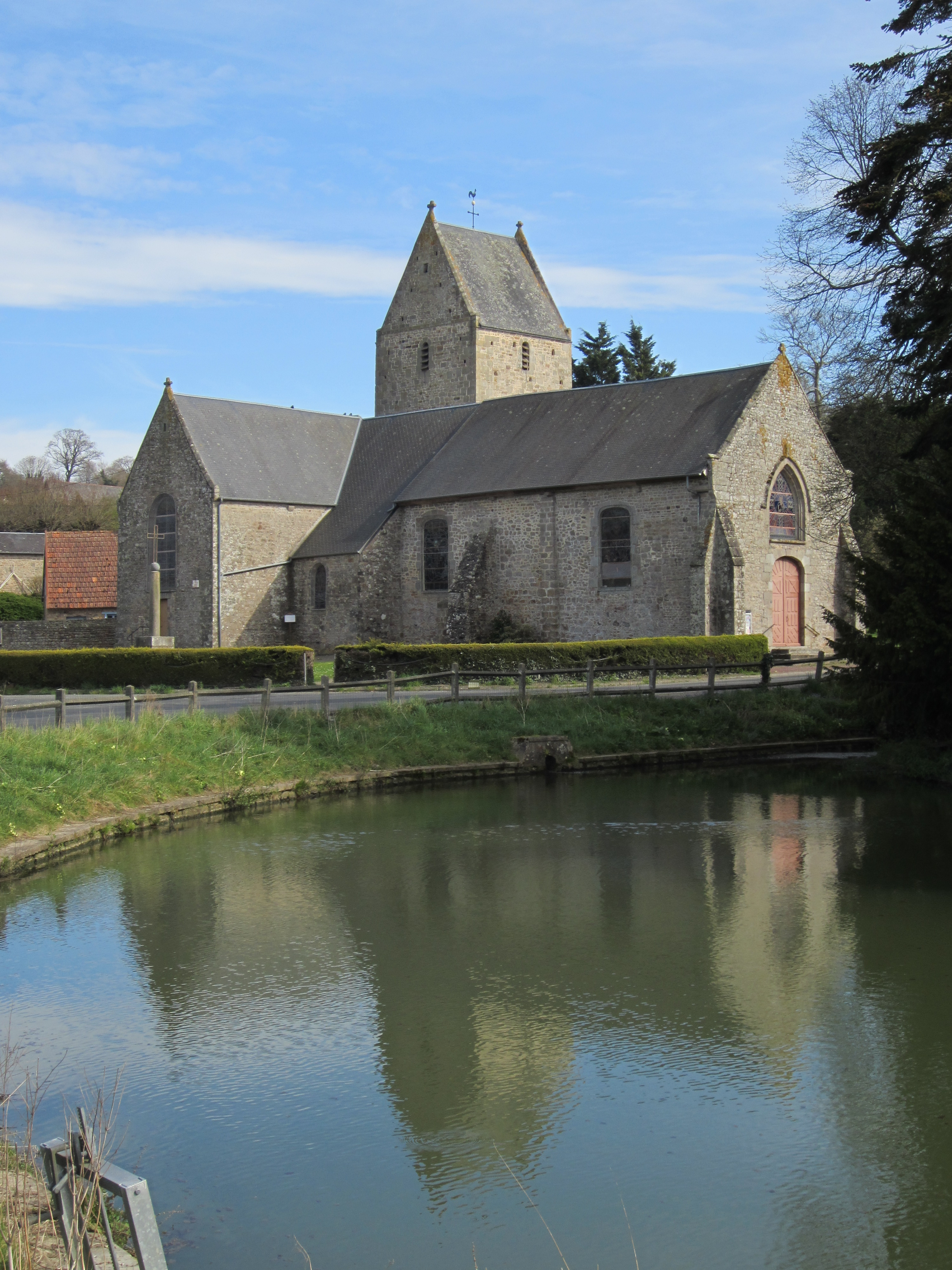 église de Saint-Pierre-Langers, Manche